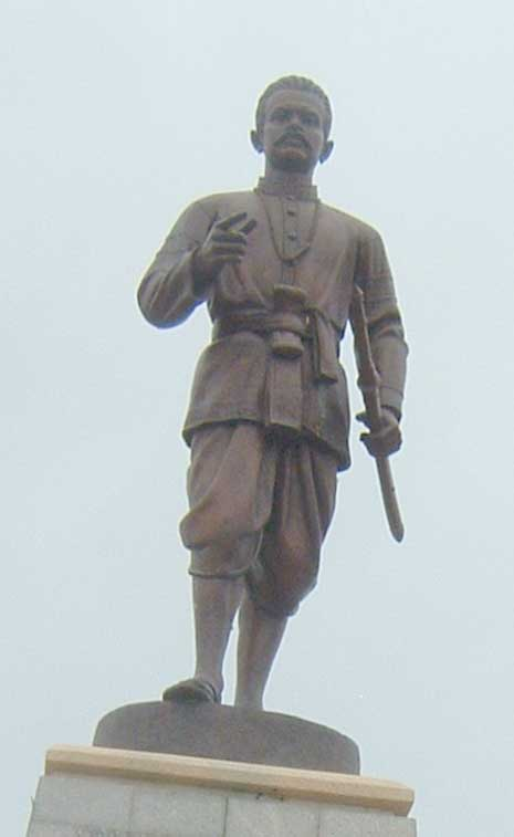 เจ้าผู้ครองเมืองทุ่งศรีภูมิ (เจ้าเซียง) เห็นว่าเมืองท่งศรีภูมินั้นตั้งอยู่ใกล้แม่น้ำเสียวถึงฤดูฝนน้ำก็ท่วม จึงปรึกษากับแม่ทัพกรุงธนบุรีเพื่อขอพระราชโองการย้ายเมืองไปยังดงเท้าสาร ซึ่งห่างจากตัวเมืองเดิมประมาณ ๑๐๐ เส้น พระเจ้ากรุงธนบุรีจึงโปรดให้ย้ายเมืองตามที่ขอ และพระราชทานนามเมืองใหม่ว่า เมืองสุวรรณภูมิประเทศราช